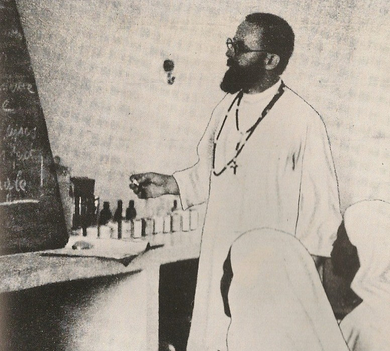 Portrait de Jean-Louis Goarnisson